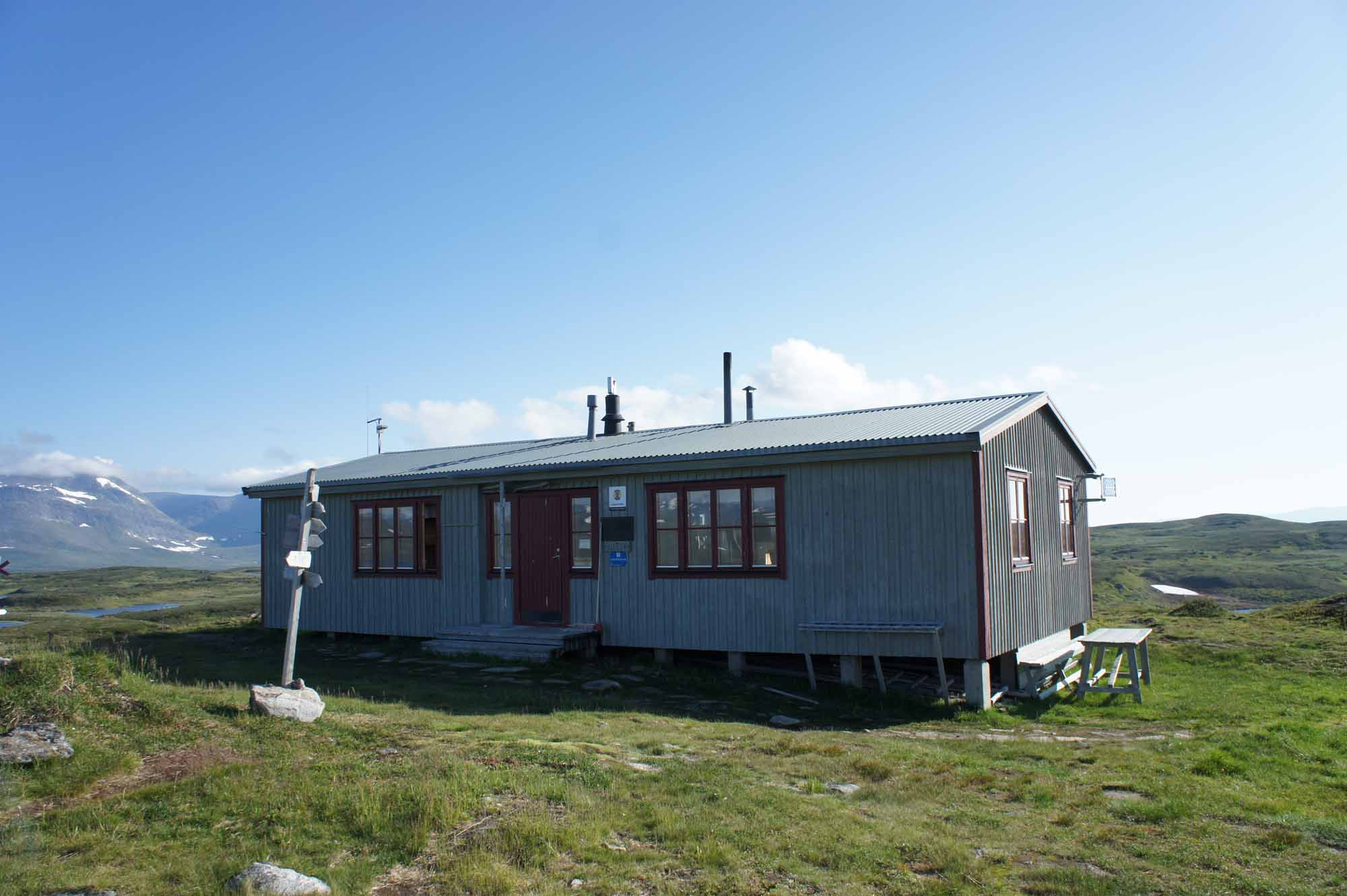 Svenska turistföreningens fjällstuga Fältjägaren